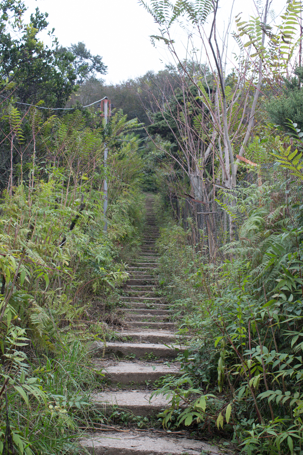 مسیر دسترسی قلعه با 311 پله